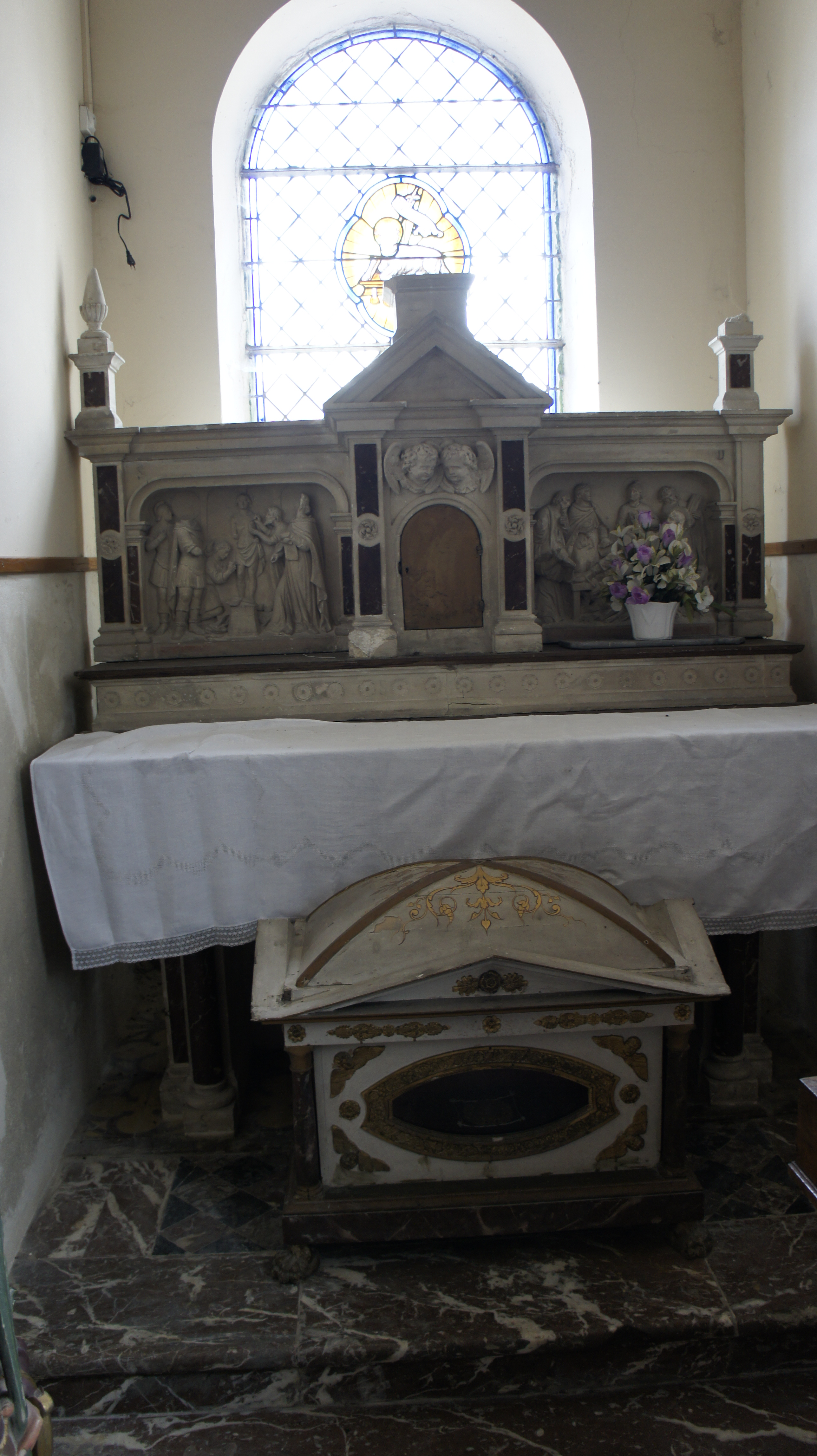 Autel de l'ouest de l'Église de Pouillon. Devant la chasse de Gorgon.